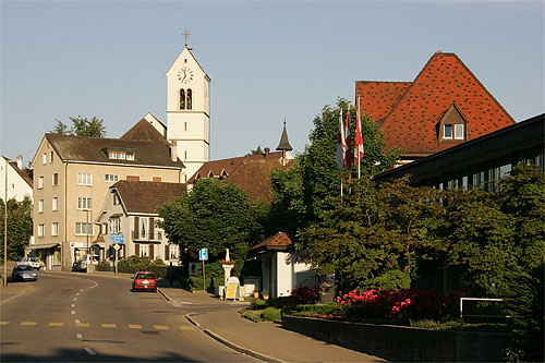 Dorfzentrum von Oberwil